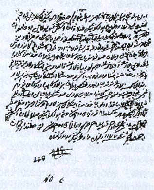 Приказ Салавата Юлаева сотнику Илятбаю Илимбаеву о наборе жителей в отряд 23 марта 1774 г.